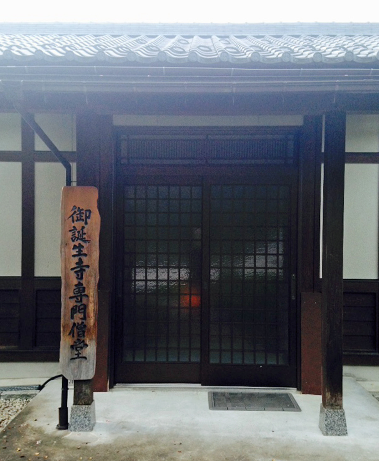 御誕生寺にある専門僧堂の入り口